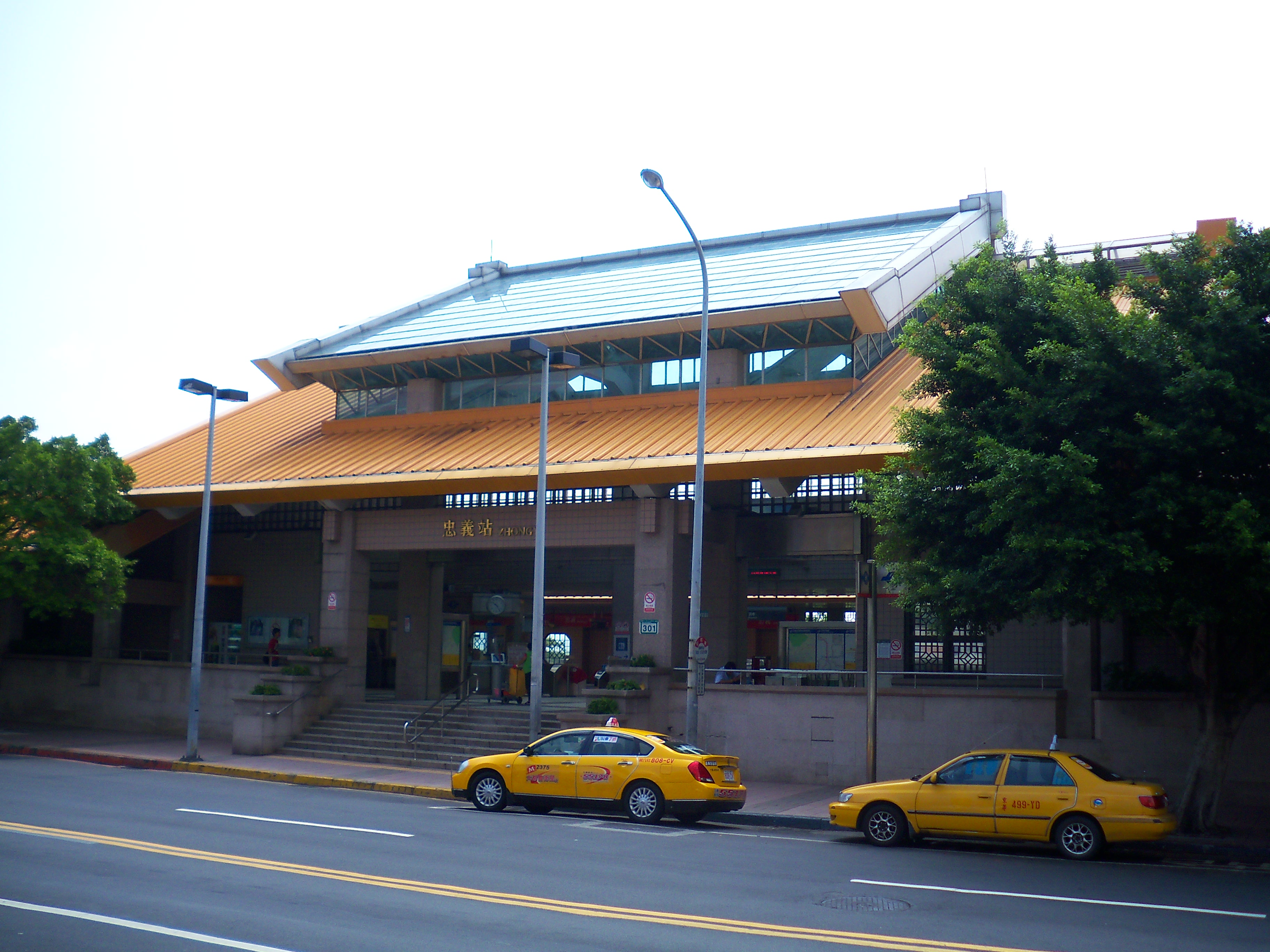 台北捷運淡水線忠義駅。